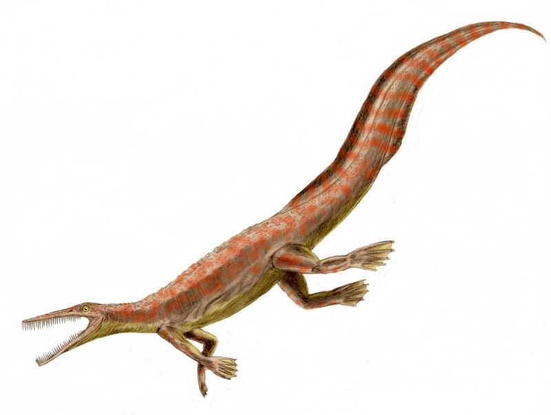 Mesosaurus, pencil drawing, digital coloring